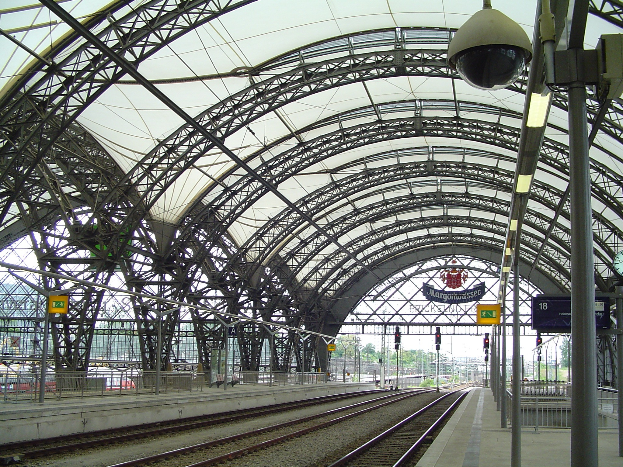 Hauptbahnhof in Dresden fertiggestellter Bereich